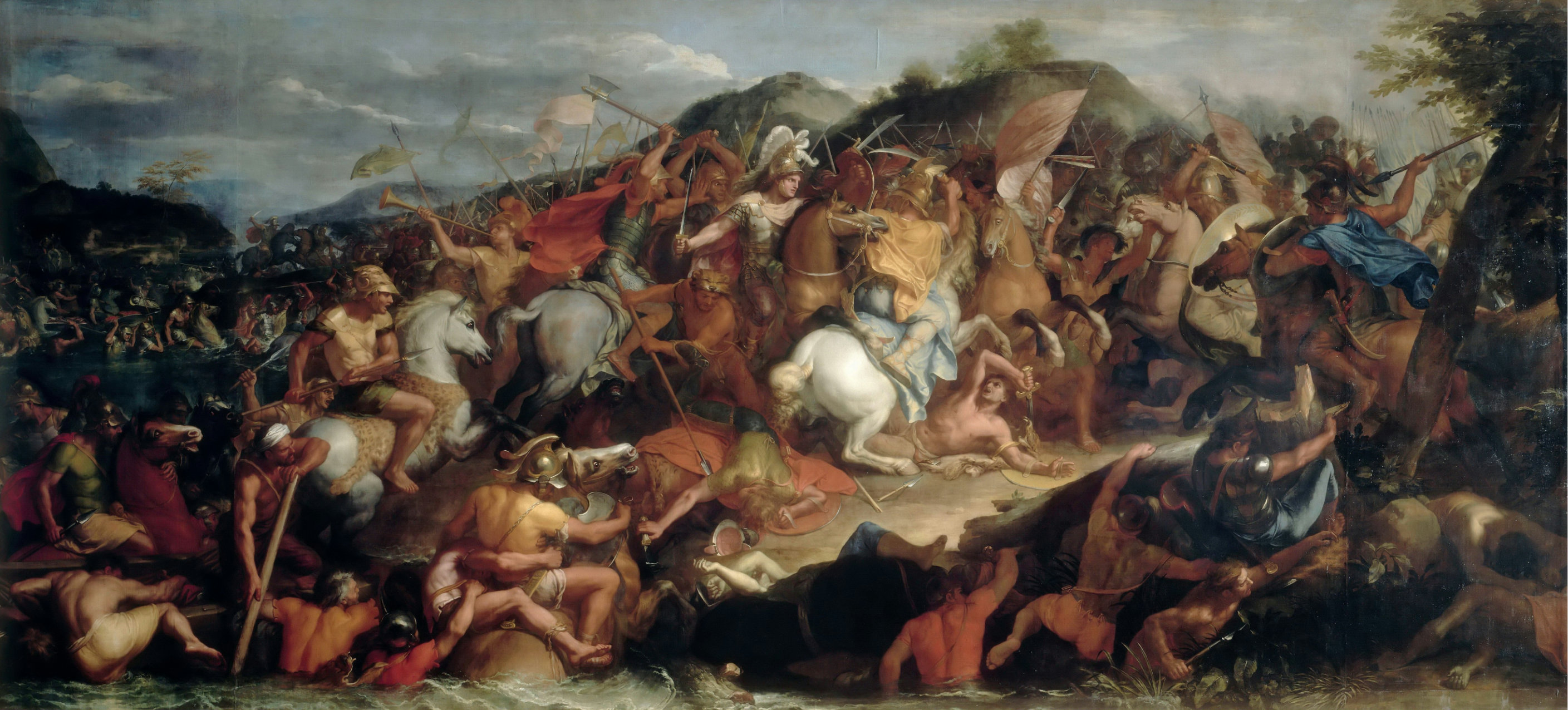 Les Grecs franchissent le Granique qui leur fermait l'entrée de l'Asie, malgré les troncs d'arbres amassés sur les bords du fleuve. Le tableau mêle des éléments de la Bataille de Cascina de Michel-Ange (disparue ; connue par la gravure), ainsi que des fresques de Raphaël et de ses élèves au Vatican : la Victoire de Constantin et Héliodore chassé du temple.